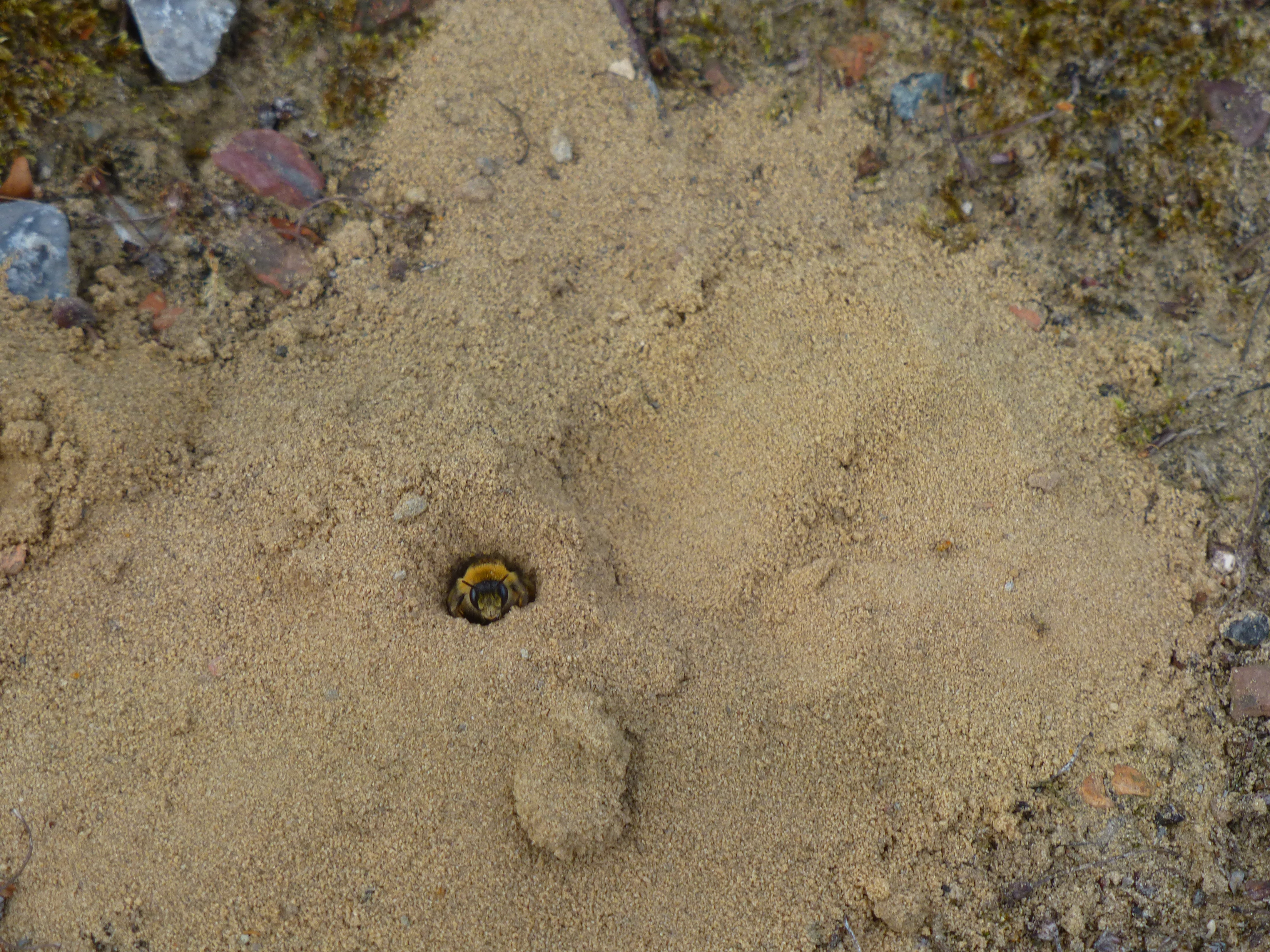 Dasypoda altercator mâle à la sortie du cône sableux de son terrier et prêt à l'envol